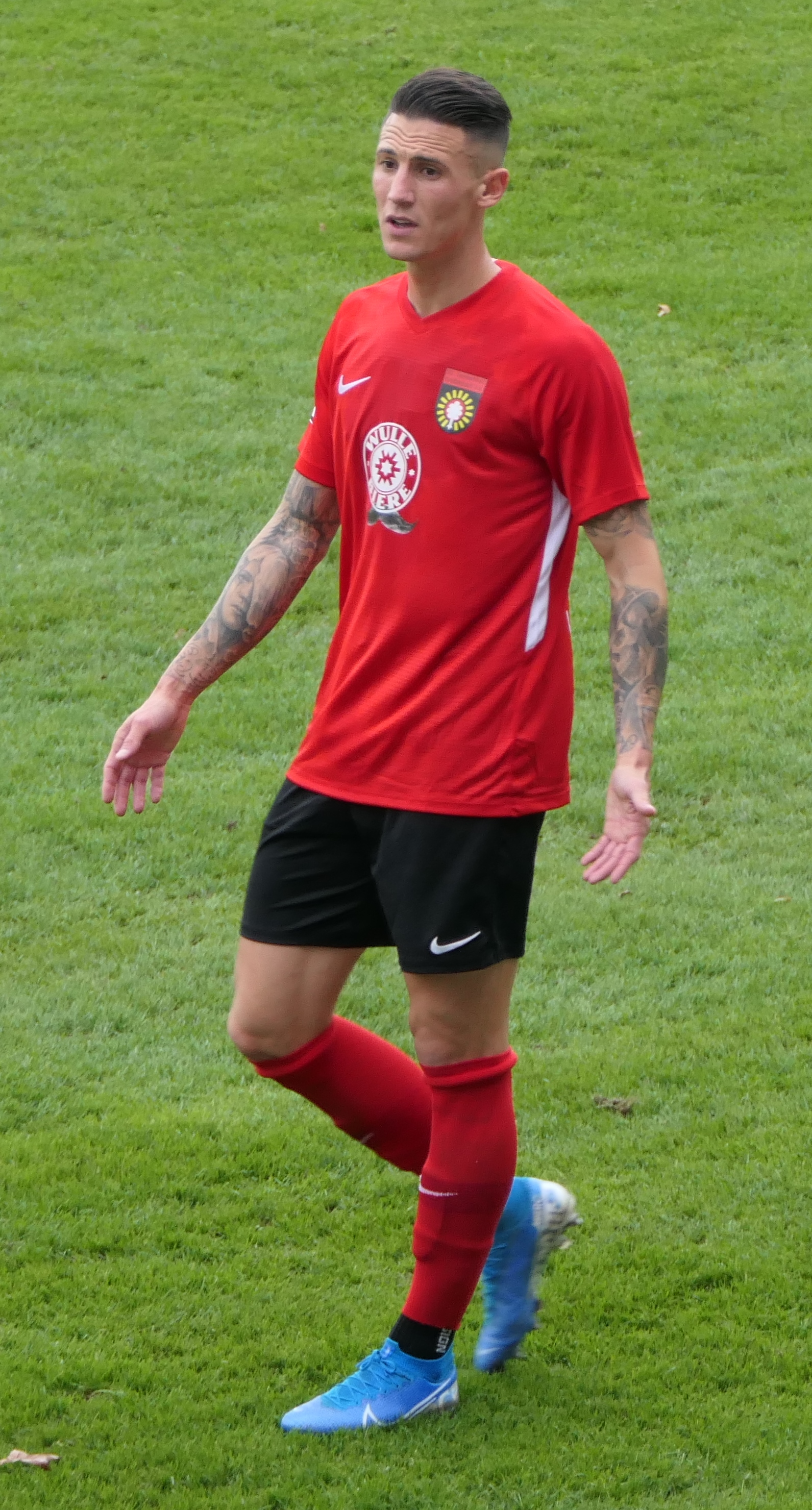 Der Fussballprofi Panagiotis Vlachodimos im Trikot der SG Sonnenhof Großaspach beim Heimspiel gegen Eintracht Braunschweig am 27.10.2019.